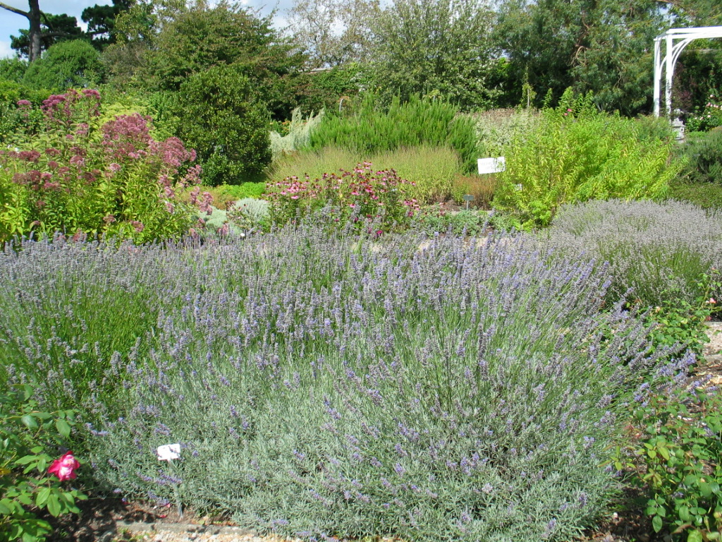 De kruidentuin op landgoed Samarès Manor. De foto is gemaakt door H. de Vegt op 26 augustus 2004.